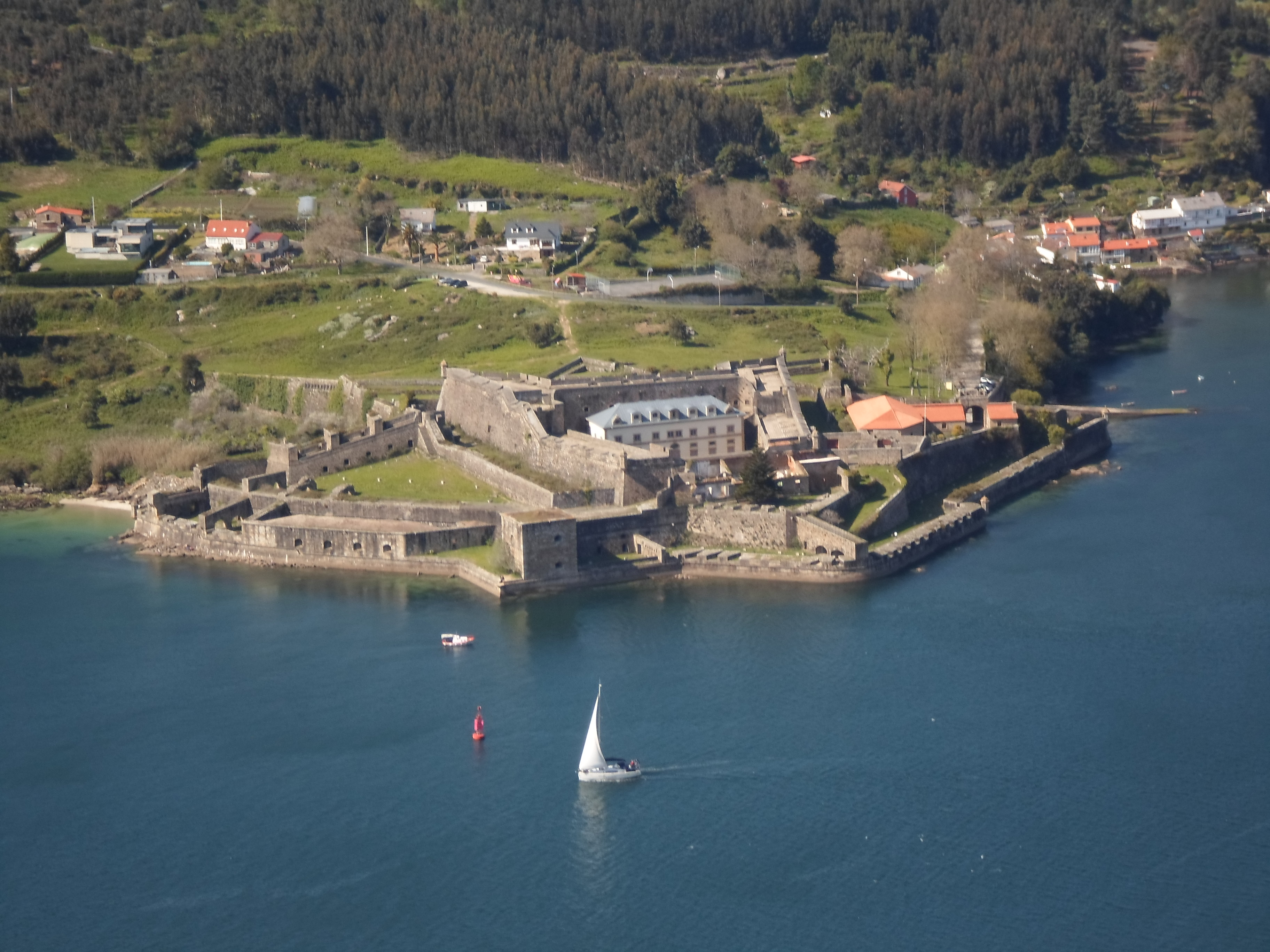 Castillo de San Felipe (en la entrada al puerto de Ferrol. Visto desde el mirador de La Bailadora (antiguas baterías de costa).